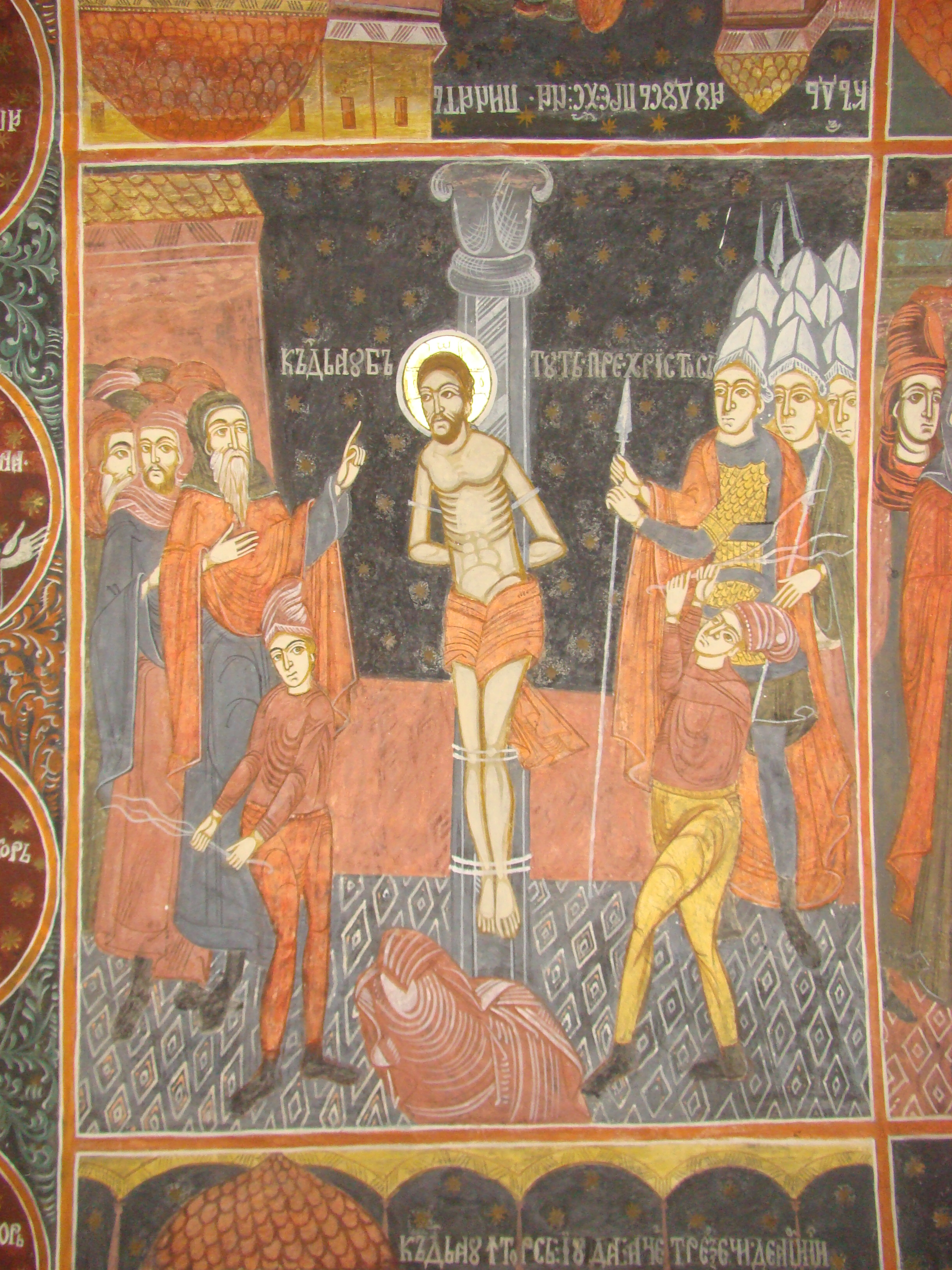 Biserica "Sf. Nicolae" din Mohu, județul Sibiu